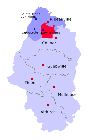 Lage von Kanton Kaysersberg im Arrondissement Ribeauvillé und im Département Haut-Rhin. Selbst erstellt von Benutzer: Jeanfrance Juni 2006